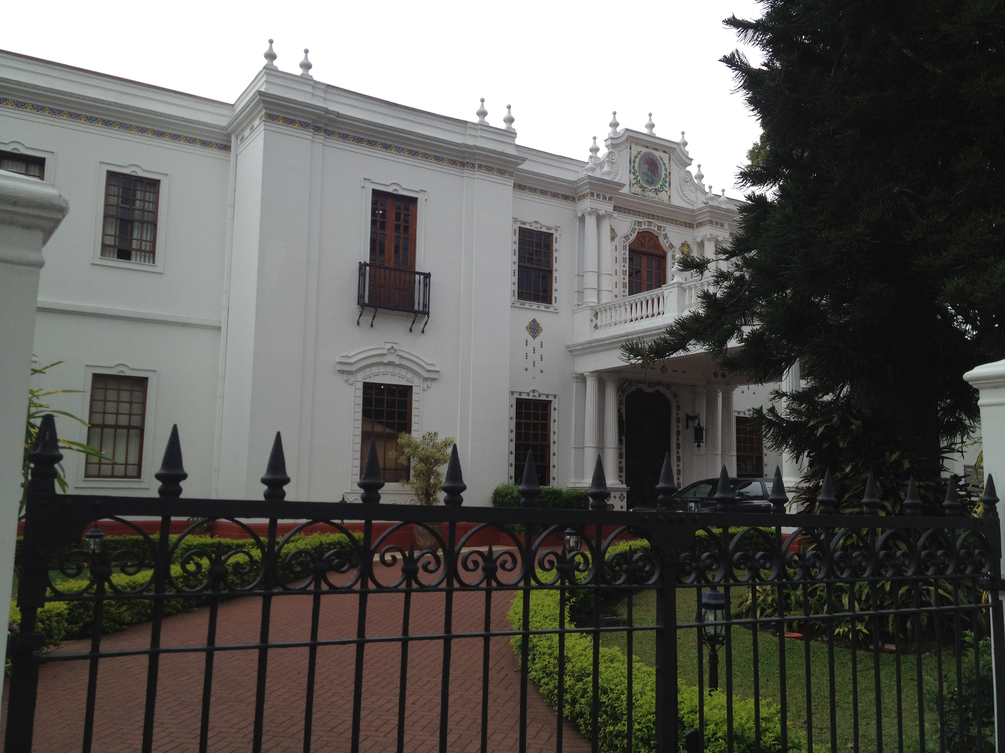 Sede de la Embajada de México en San José, Costa Rica.